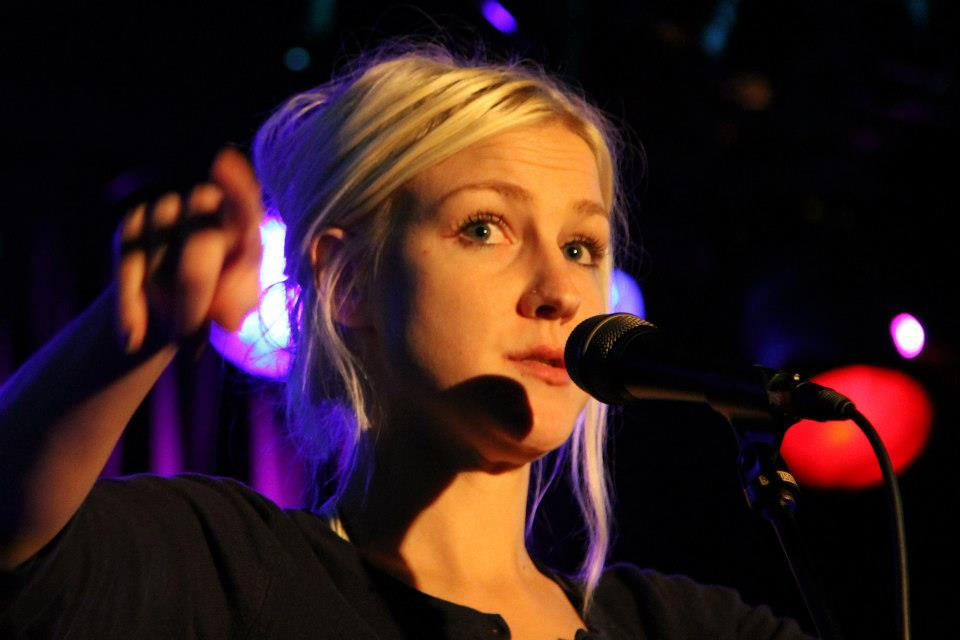 Johanna Emanuelsson talar på Spingo-stipendiets utdelning 2012.